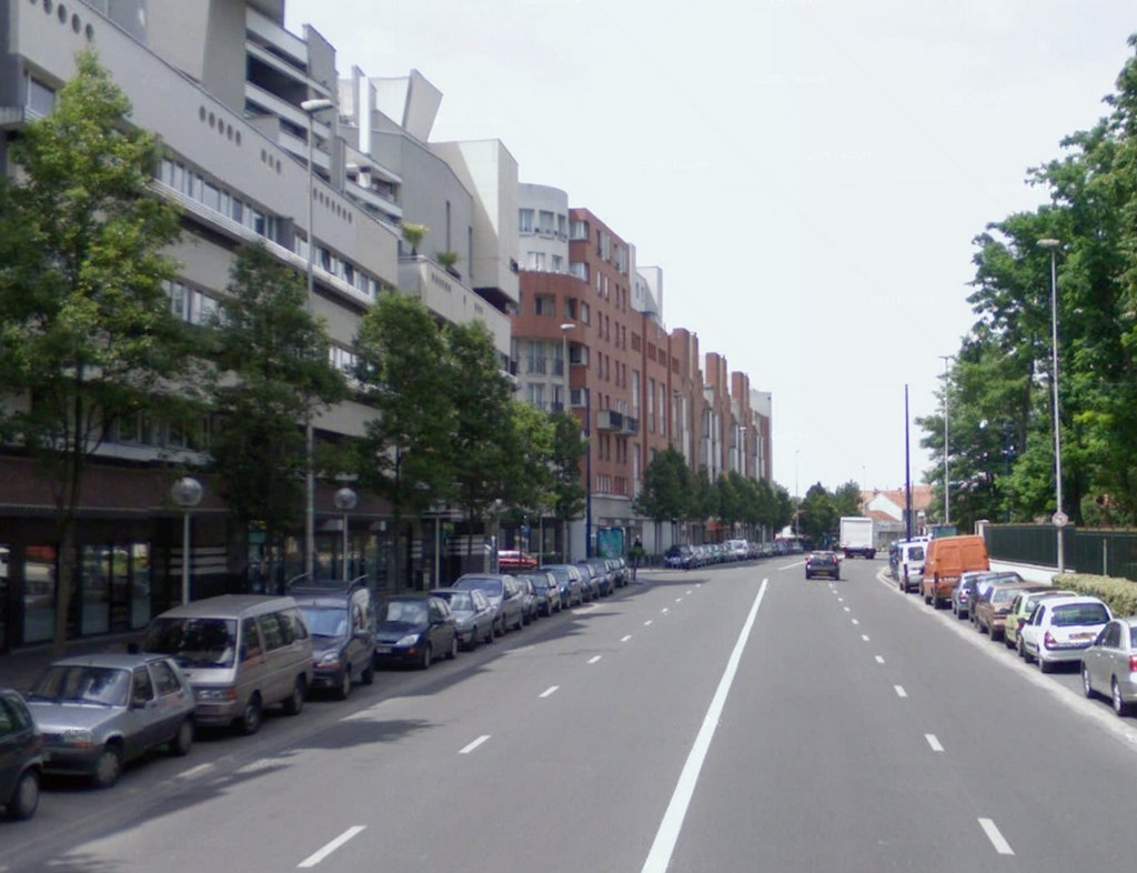 Les immeubles de la rue Sadi Carnot qui ont vu sur le parc de Ladoucette